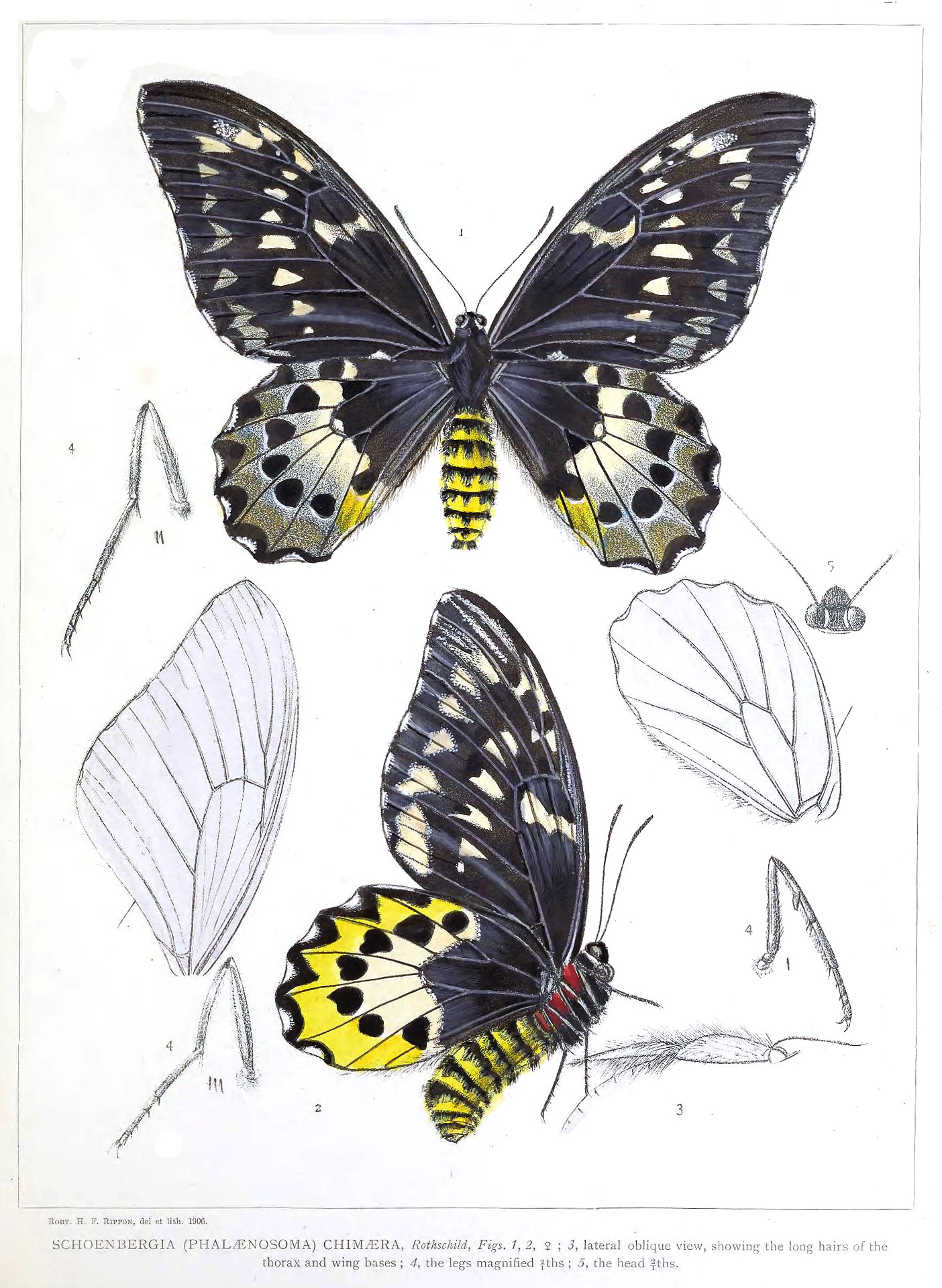 Schoenbergia chimaera